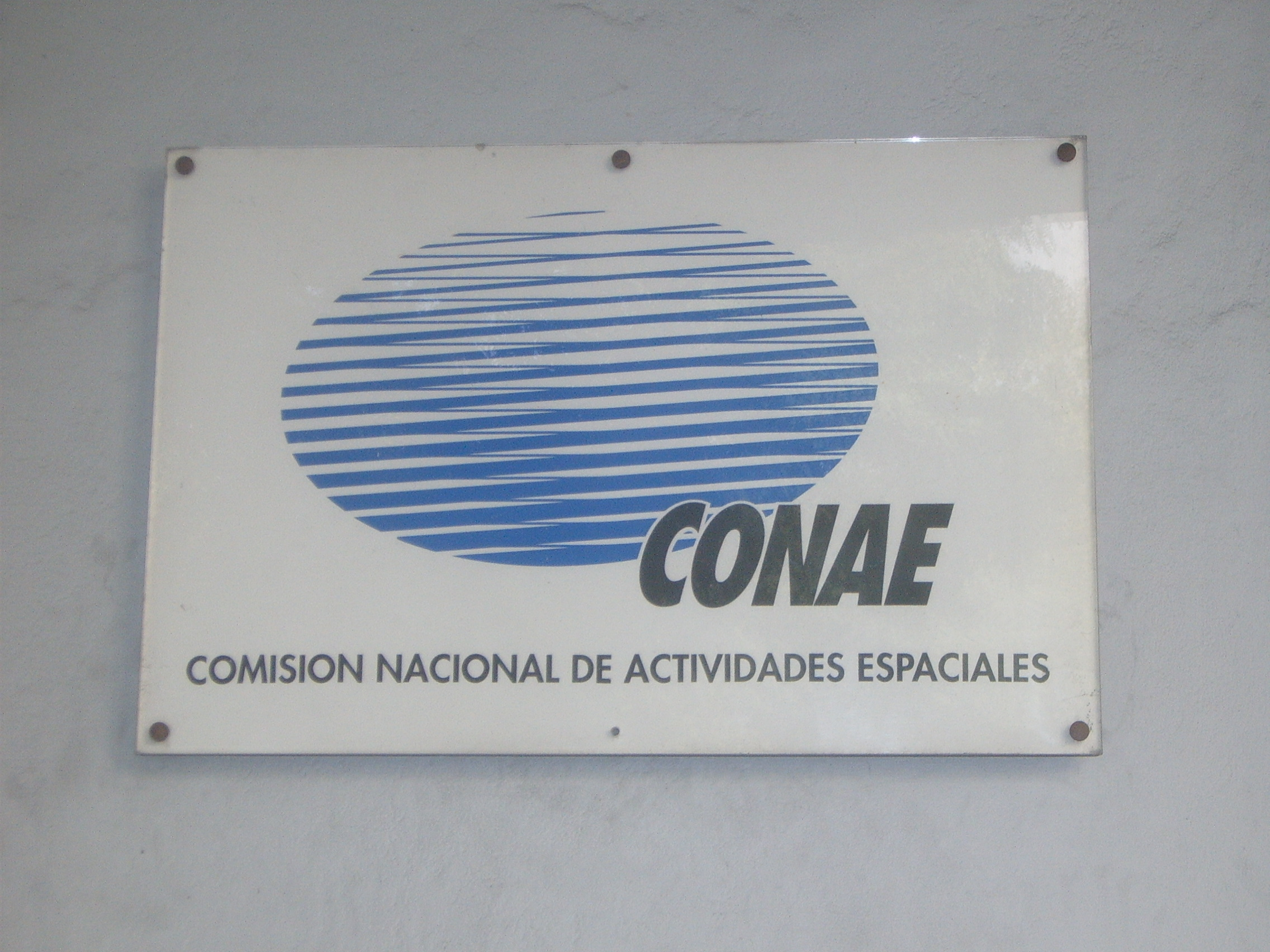 Logo de la CONAE en su sede en Capital Federal